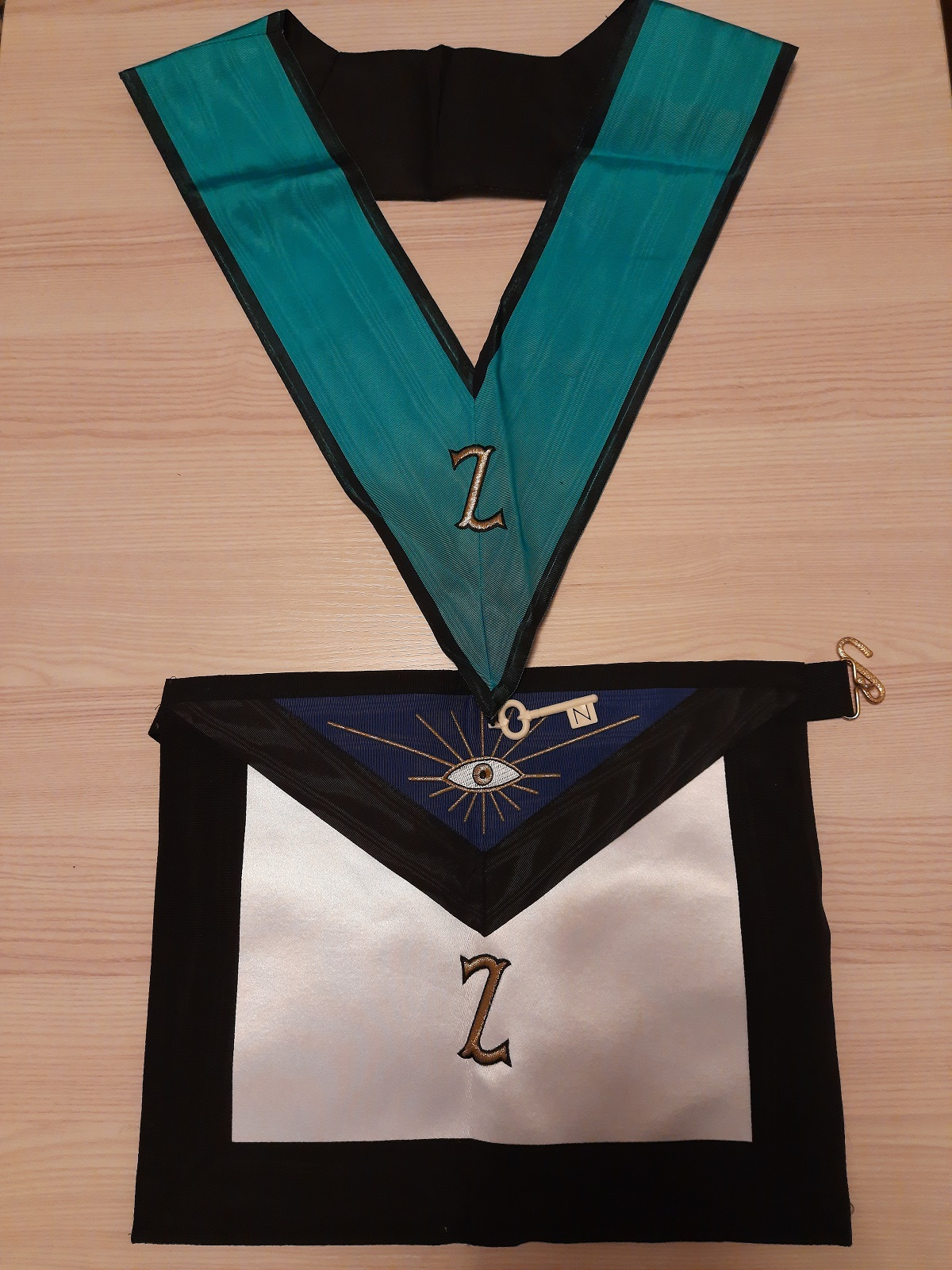 Secret Master 4°